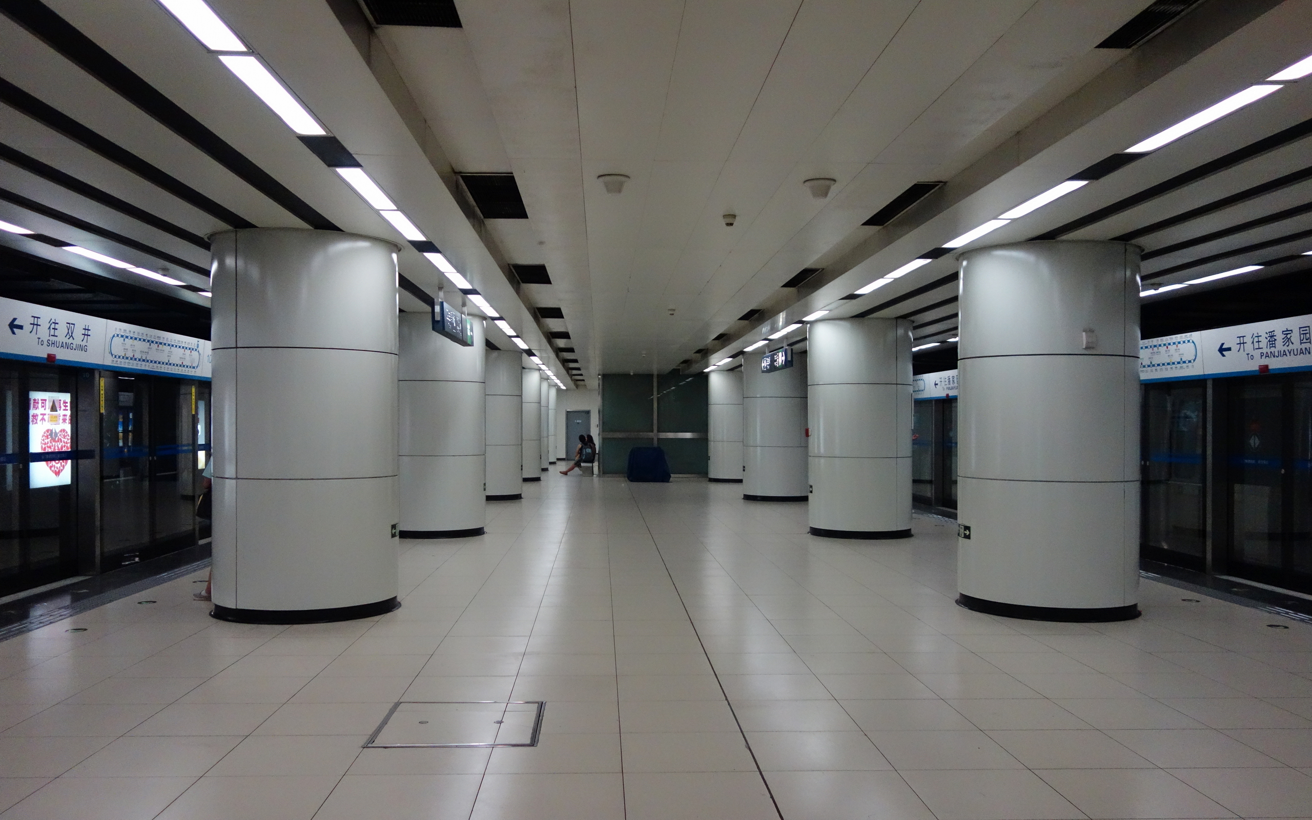 北京地铁10号线站台